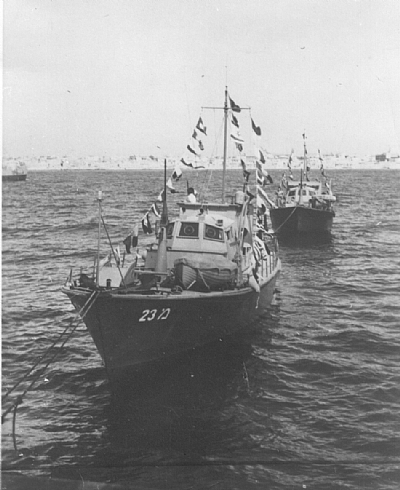 ספינת משמחר אח"י סער מ-23